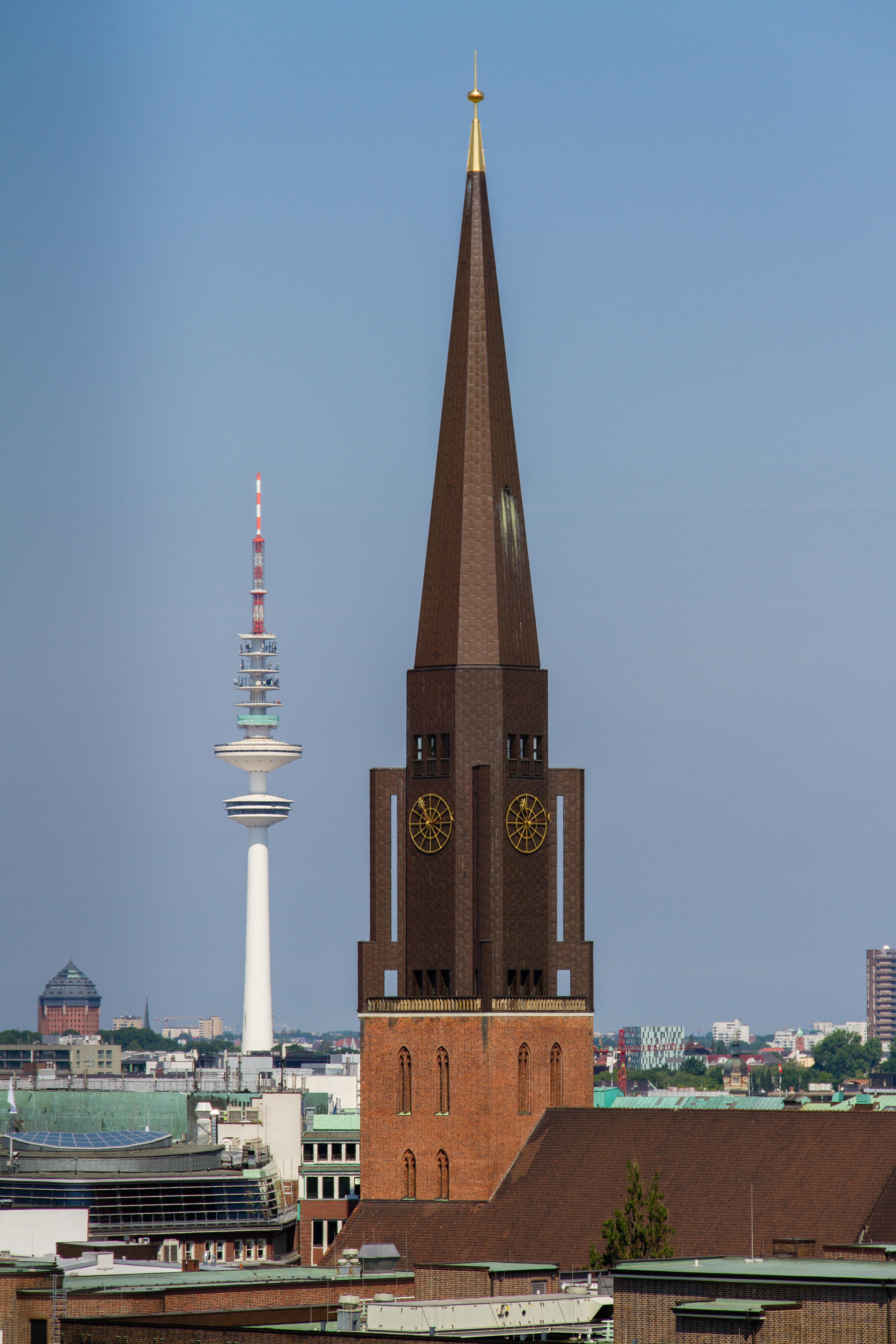 Aufnahme während des Projekts Heißluftballon